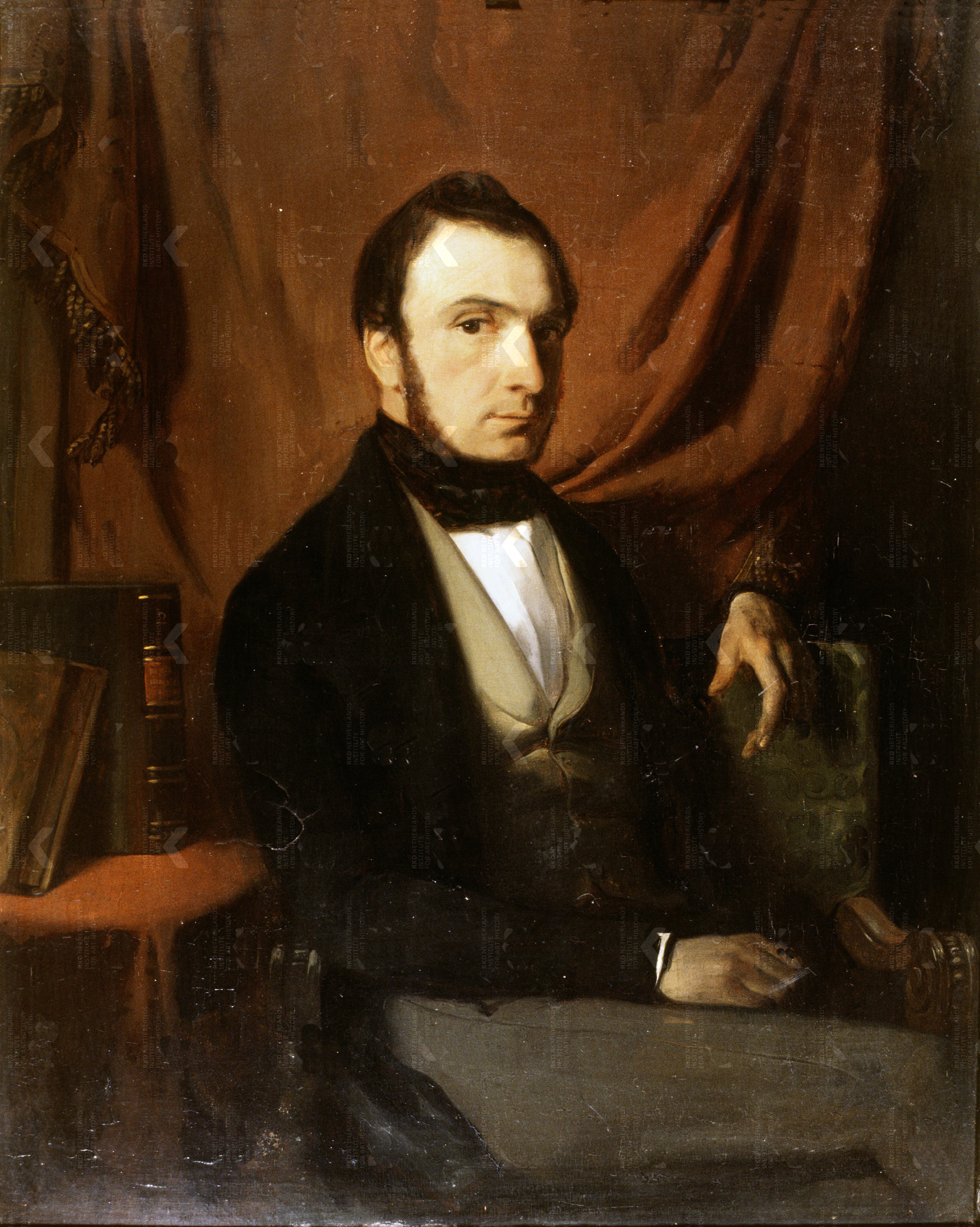 Portret van Cornelis Jacob Bosman